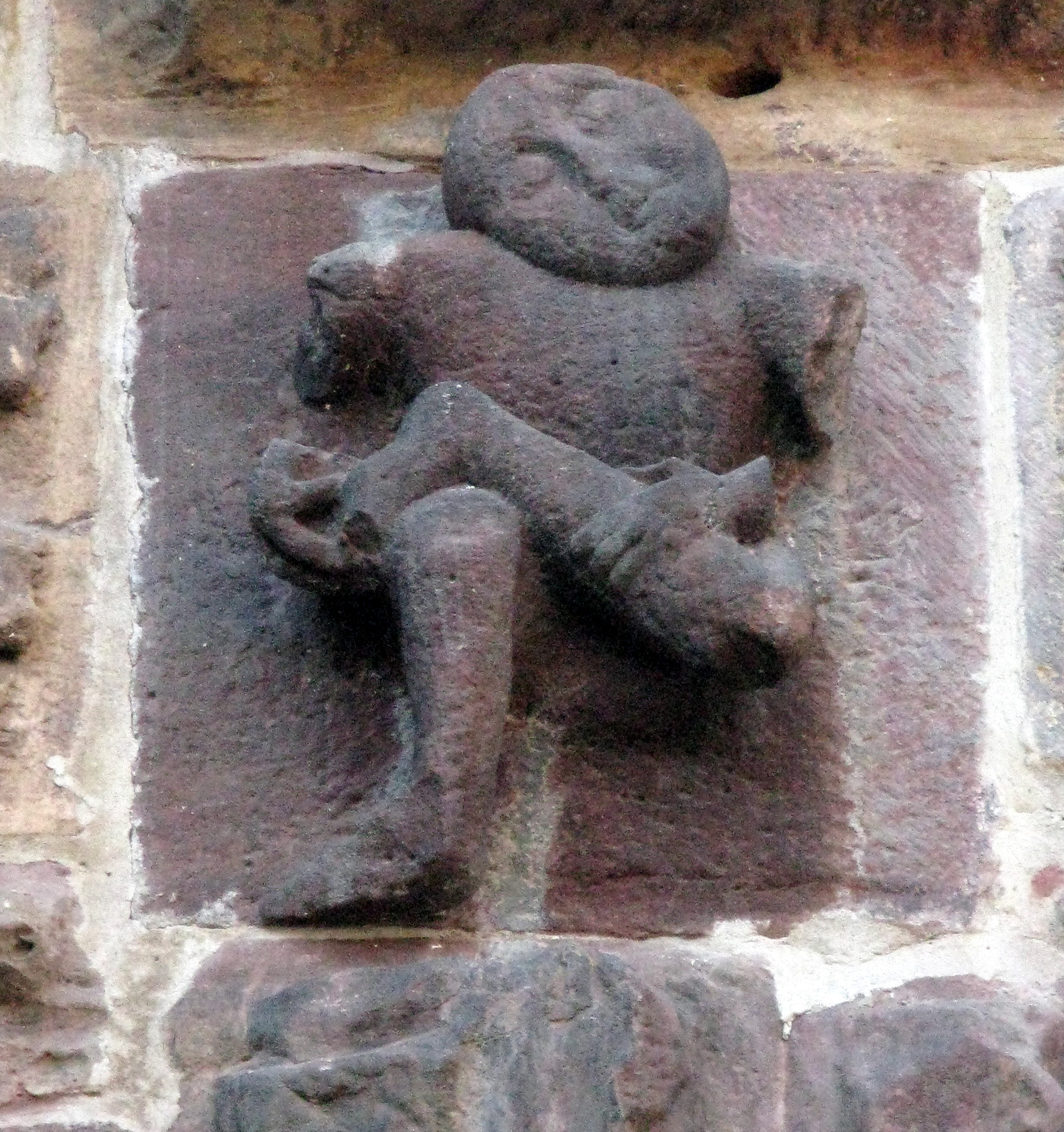 Romanische Darstellung des Dornausziehers auf der Stadtseite des Freiburger Schwabentores